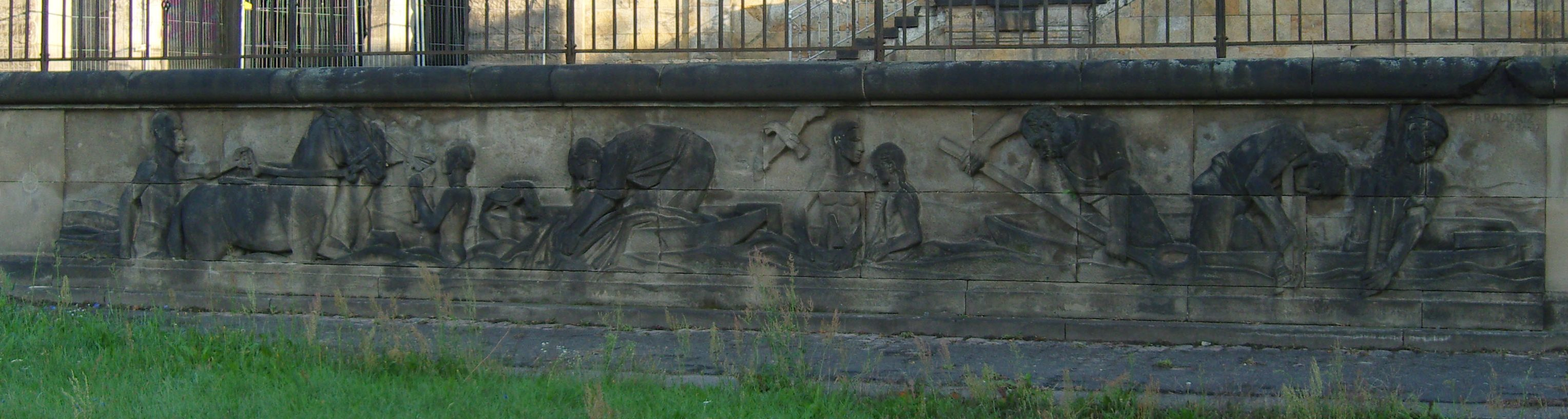 Relief von Herrmann Alfred Raddatz geschaffen. Es stellt Männer dar, die vermutlich Schiffsverladearbeiten durchführen sowie einen Fährmann mit seinem Kahn